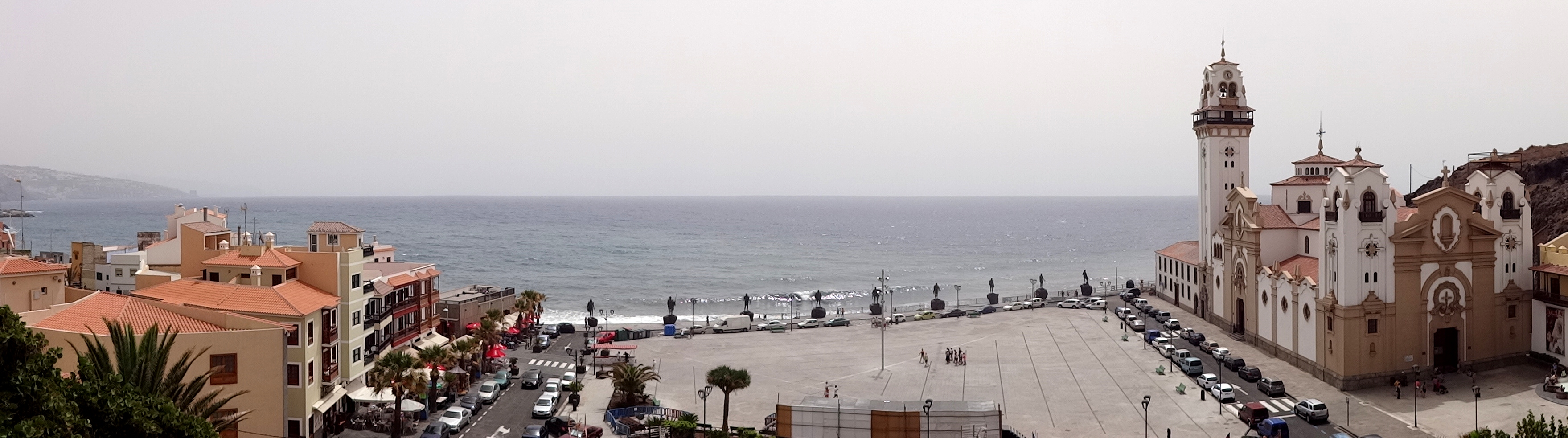 Basilica de Nuestra Senora de la Candelaria